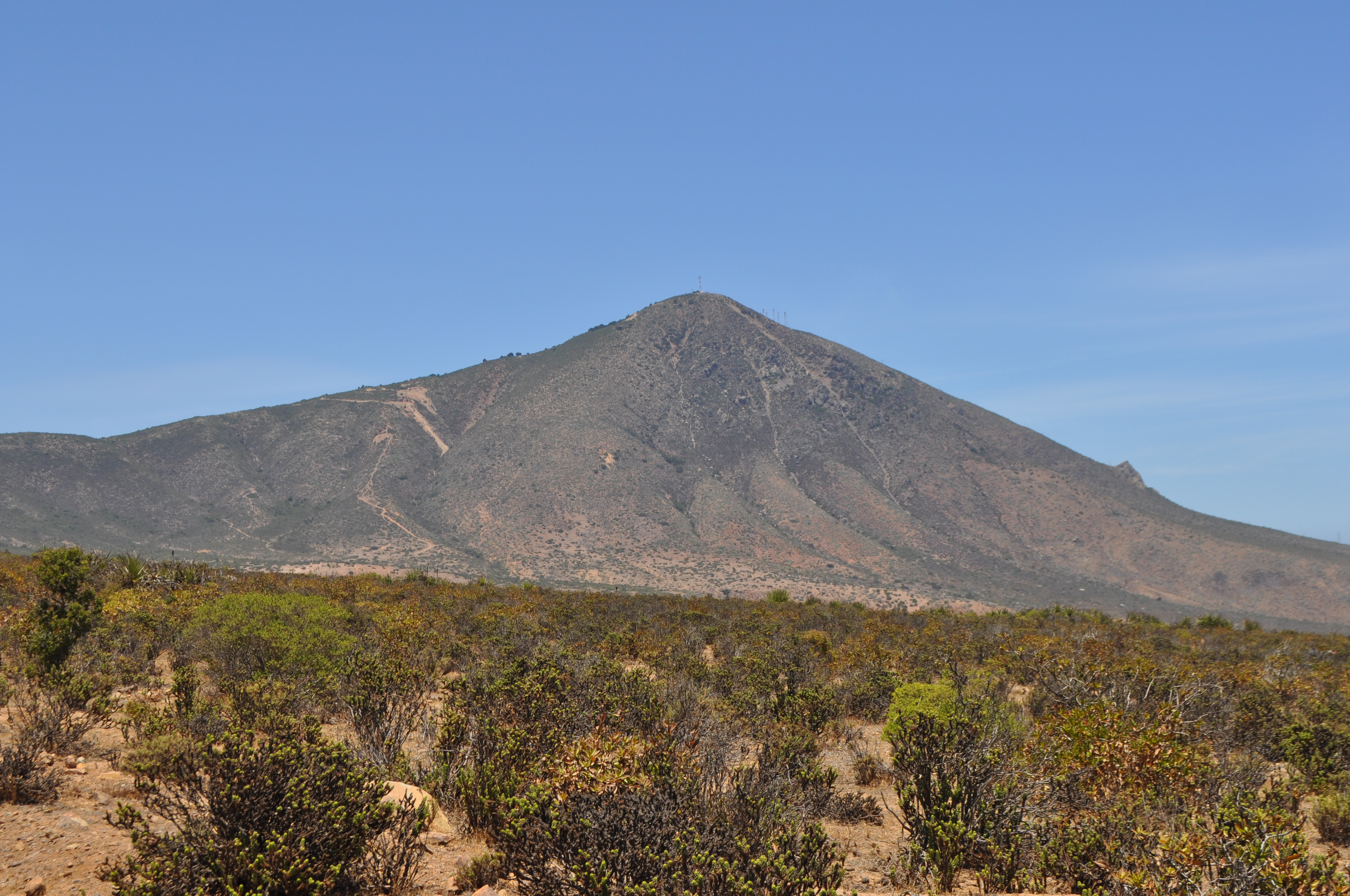 Cerro Santa Inés, IV Región de Coquimbo, Chile. Vista desde el norte.